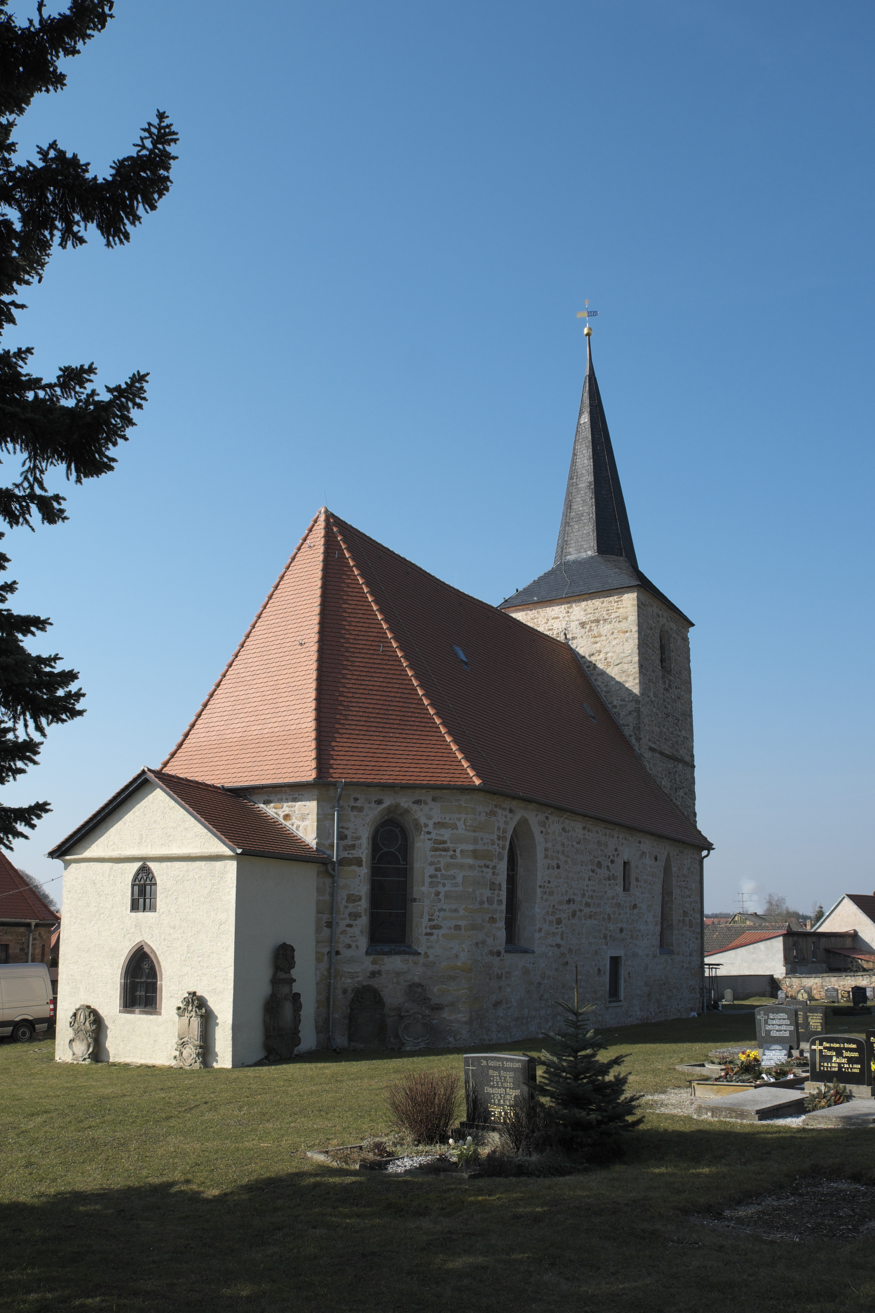 Dorfkirche in Lossa (Finne) im Burgenlandkreis in Sachsen-Anhalt/Deutschland